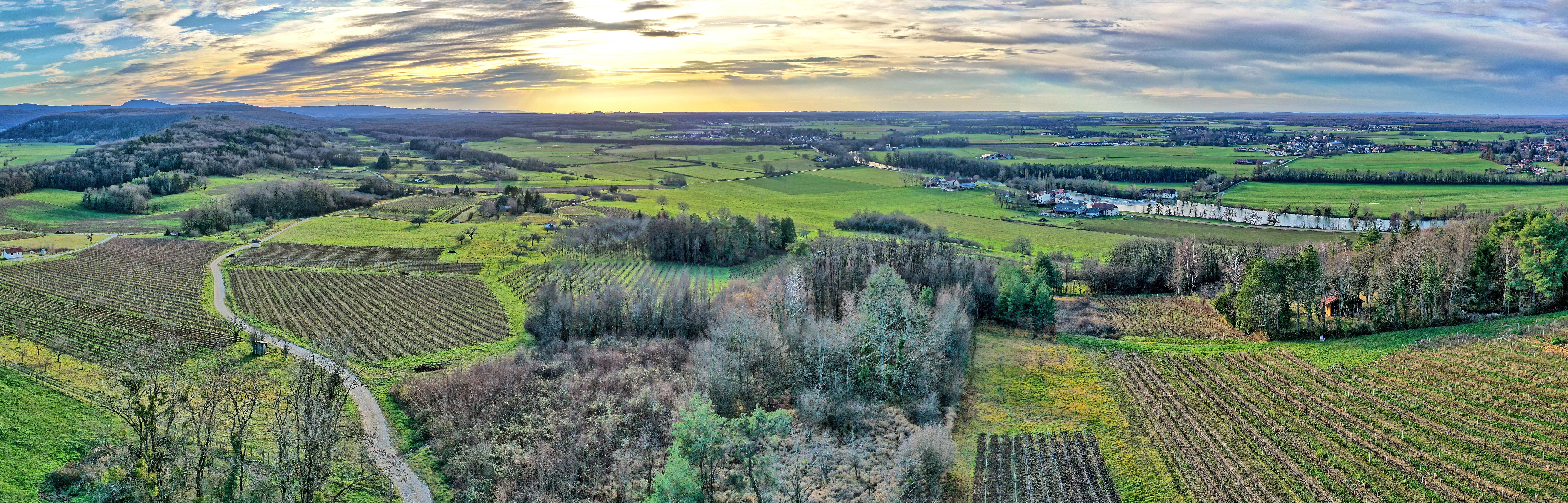 Panorama sur le Val d'Amour depuis les vignes du Peux